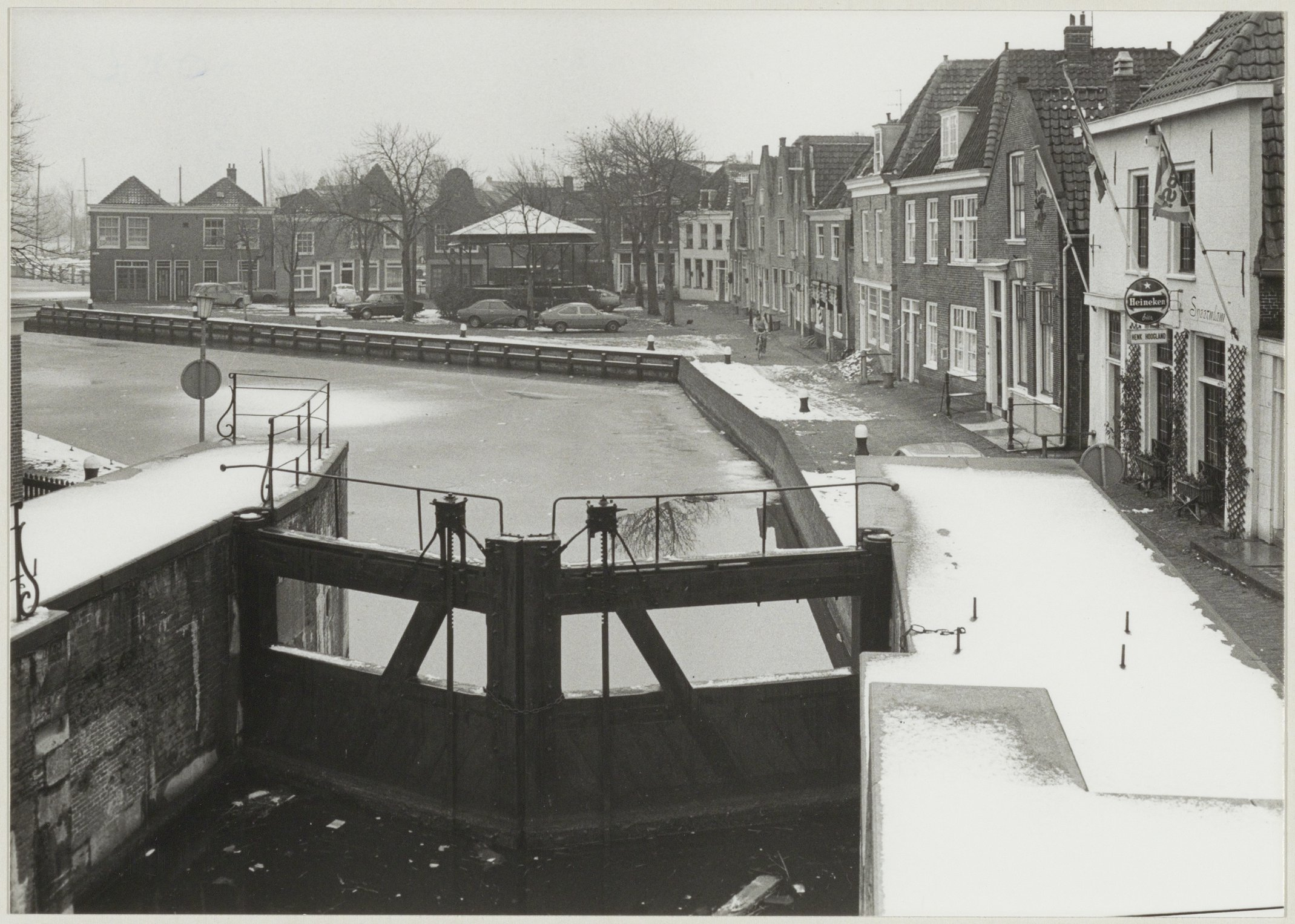 CollectieCollectie Fotoburo de BoerInventarisnummerNL-HlmNHA_54010427NL-HlmNHA_1478_18911KBeschrijvingWintergezicht op de Westkolk ziende vanaf de Kolksluis in Spaarndam naar het zuiden.FotonummerNL-HlmNHA_1478_5924DocumenttypeTopografische prenten, tekeningen en foto'sVervaardigerBoer, Cees de (1918-1985) Soort vervaardigerFotograaf AnnotatiesU1-4 HD290180LandNederland ProvincieNoord-Holland GemeenteHaarlem PlaatsSpaarndam StraatWestkolk GeografischSpaarndam-West Begindatum01-1980Einddatum01-1980TechniekFoto TrefwoordenWintergezichten, sluizen